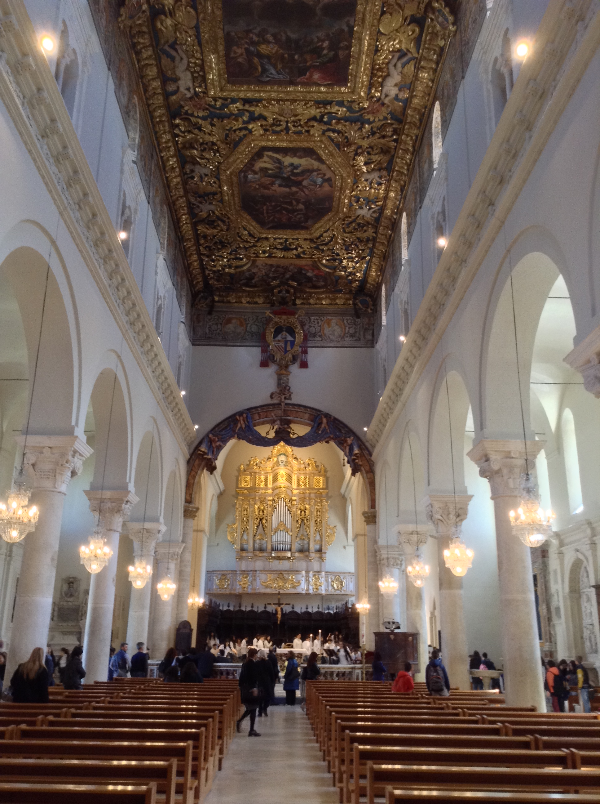 Kathedrale in Gravina in Puglia